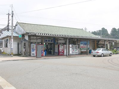 Shinmei Station (Fukui)